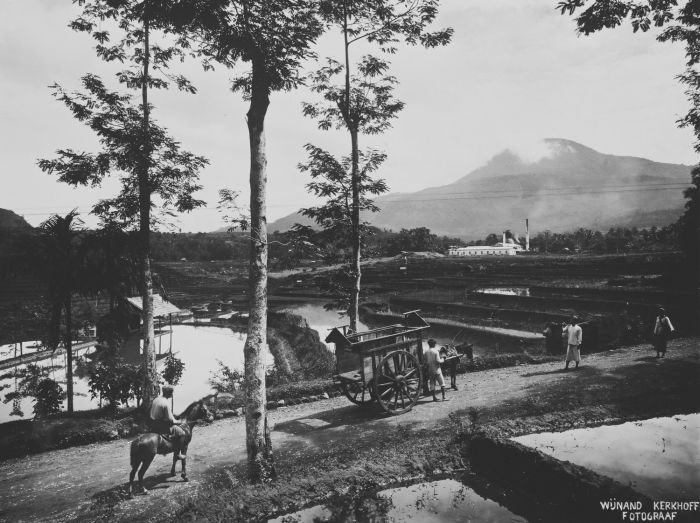 foto. Javanen passeren elkaar op een weg door de sawa's bij Soemedang ter hoogte van een fabriek waar sereh wordt verwerkt